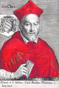 Cardinale Ottavio Bandini